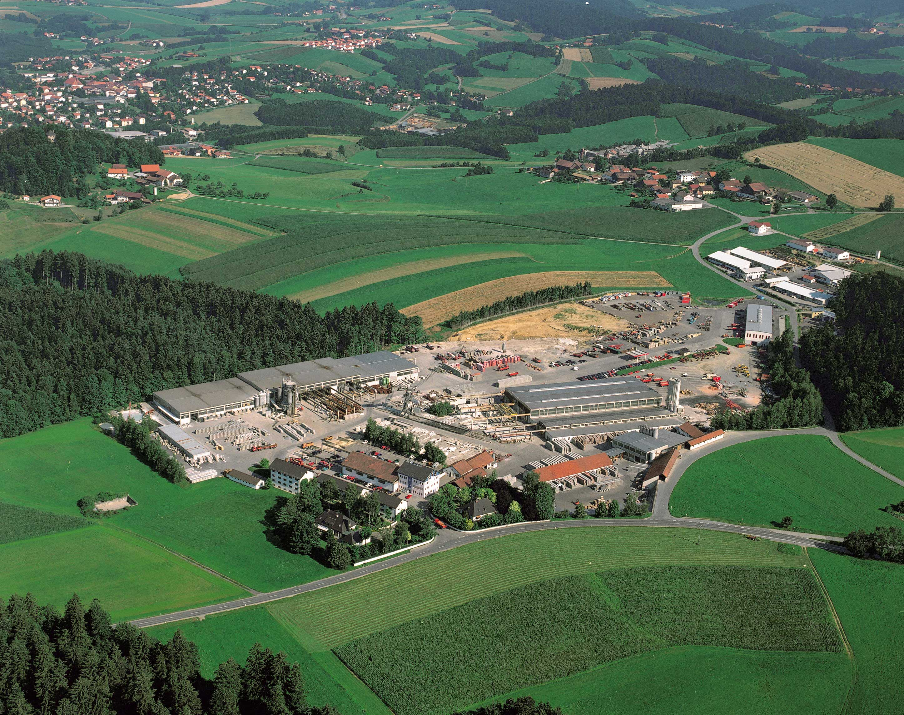 Stammhaus Deching